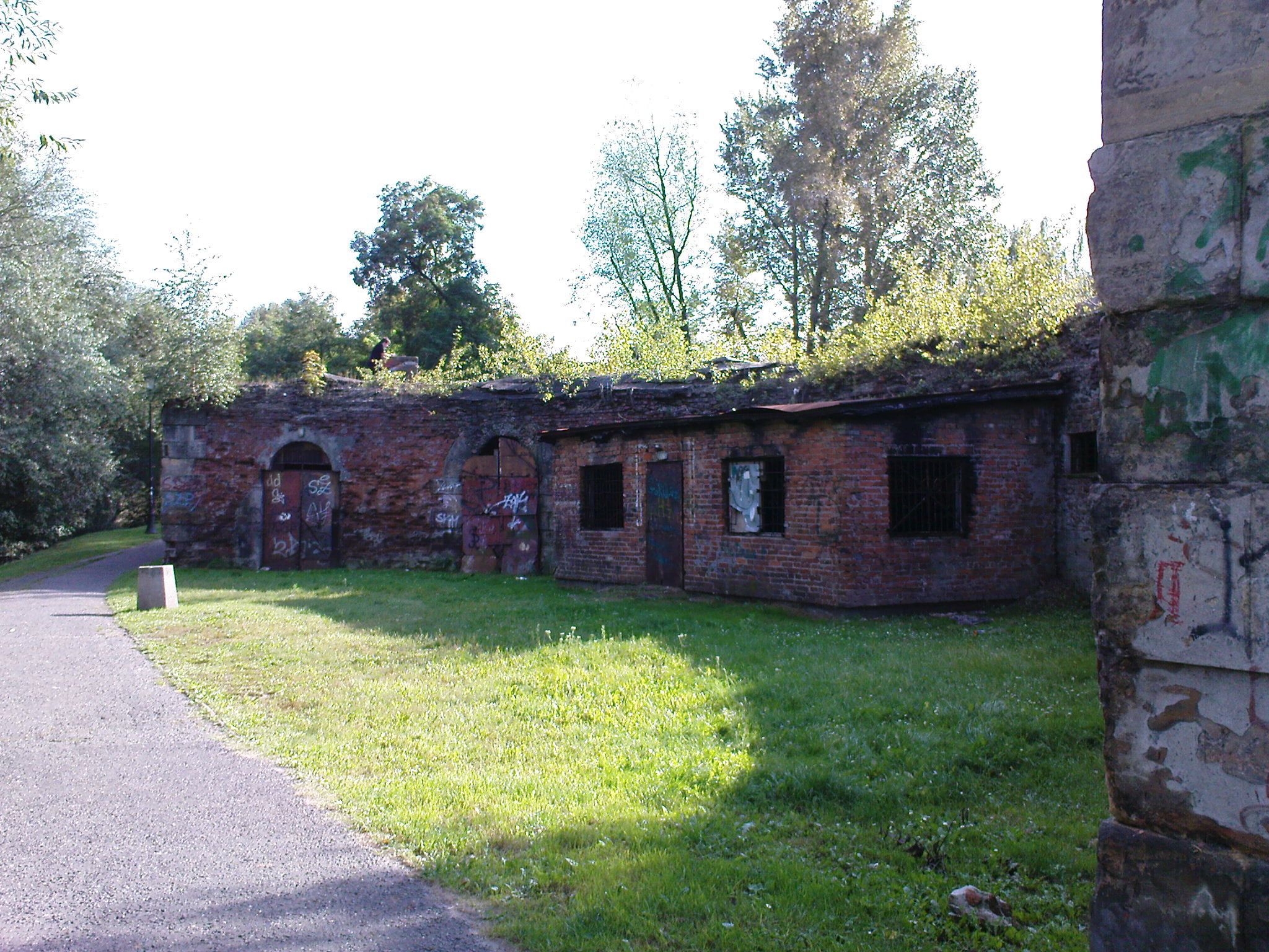 Działobitnia to taka część obiektu fortyfikacyjnego która służy do prowadzenia ognia artyleryjskiego. Jest to stanowisko dla baterii dział lub pojedynczego działa. Zazwyczaj jest to starannie przygotowana platforma ze osłoniętymi przed ogniem wroga stanowiskami artyleryjskimi, z zapleczem technicznym, pomieszczeniami dla obsługi, oraz magazynem amunicji. Na fotografii przedstawiono działobitnię skierowaną od Cytadeli w kierunku ulicy Mickiewicza i pl. Inwalidów.